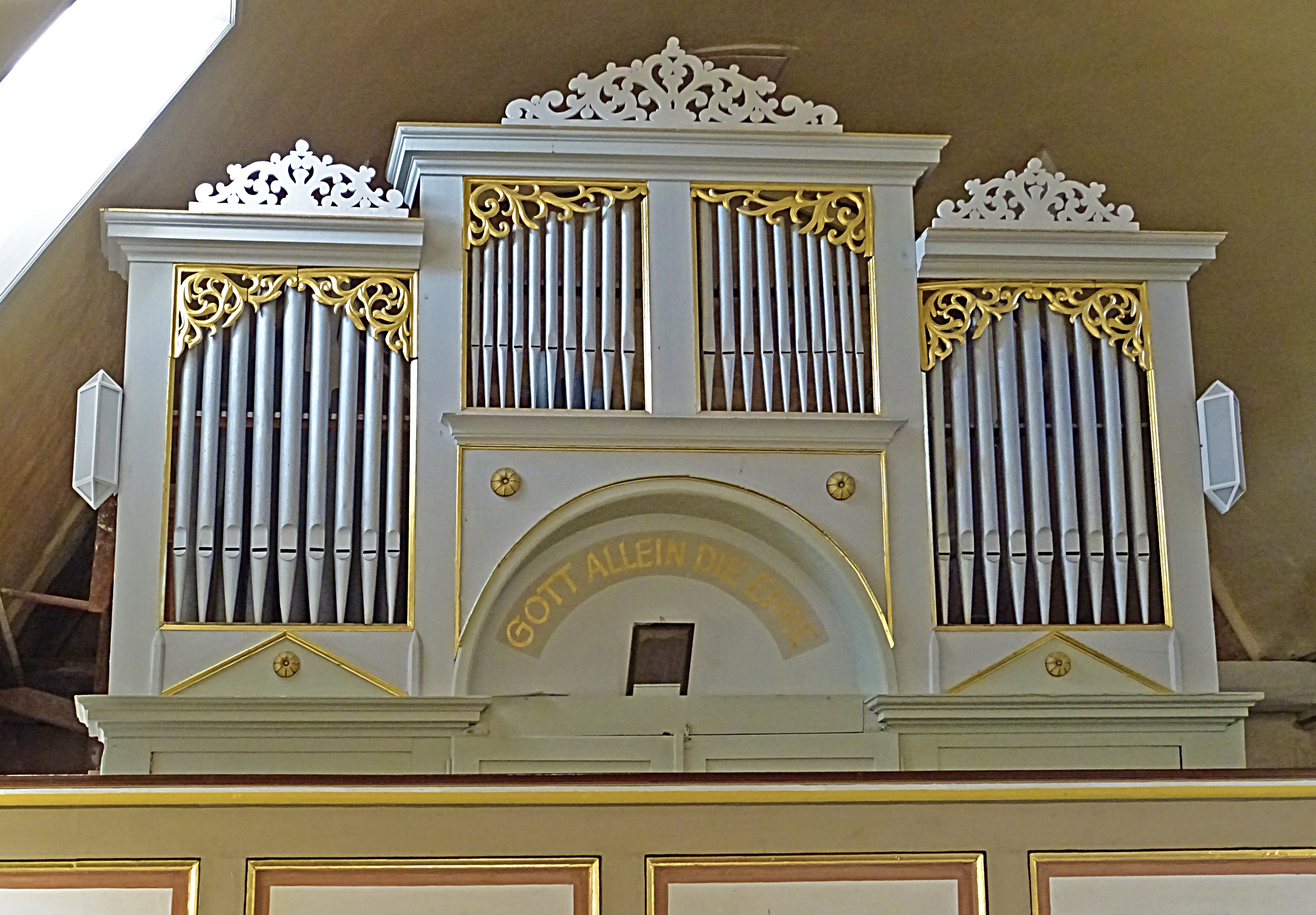 Orgel von Carl Heyder (1850, I/P 11) in St. Katharina (Wintzingerode)[1]